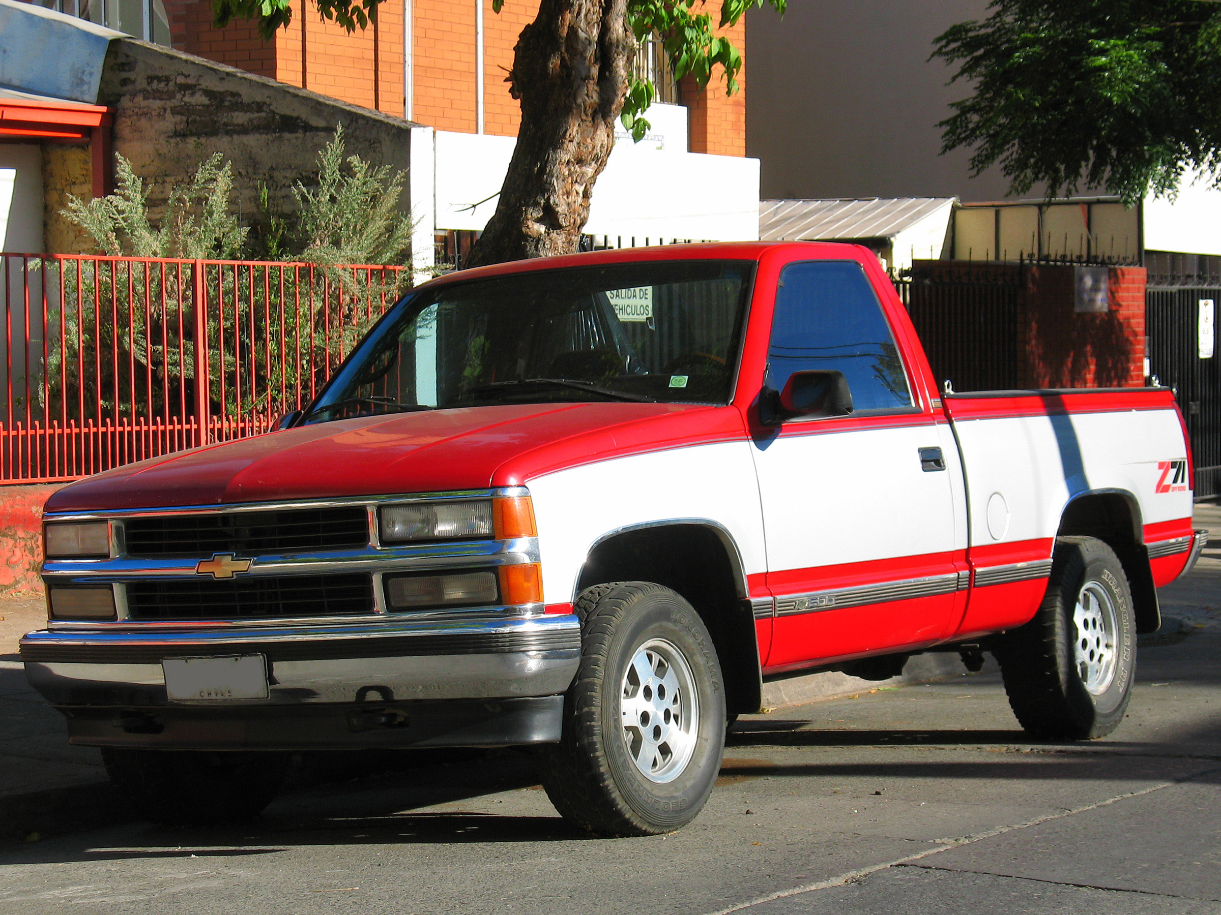 Chevrolet 1500 Silverado Z71 1995